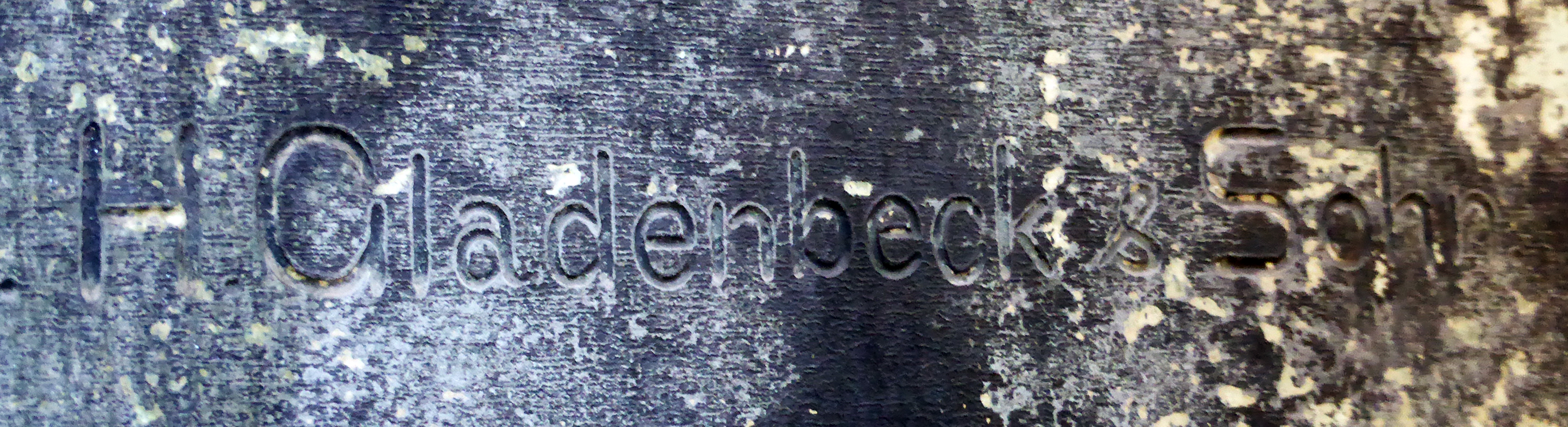 Bronzebüste Friedrich Neuhaus vom Bildhauer Karl Keil von 1883 stand bis 1987 vor dem Hamburger Bahnhof (Berlin). Gießerstempel H. Gladenbeck & Sohn. Heute ausgestellt im Deutschen Technikmuseum in Berlin. Inventarnummer: VBM E-B-5000. Wikipedianische KulTour am 10. Oktober 2015 in der Ausstellung des Museums.